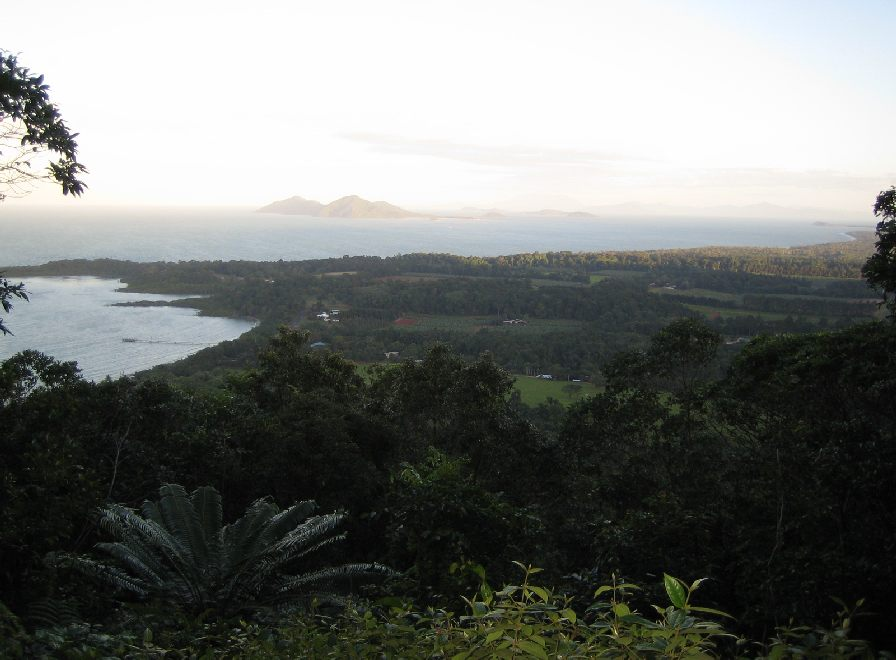 Mission beach-queensland1